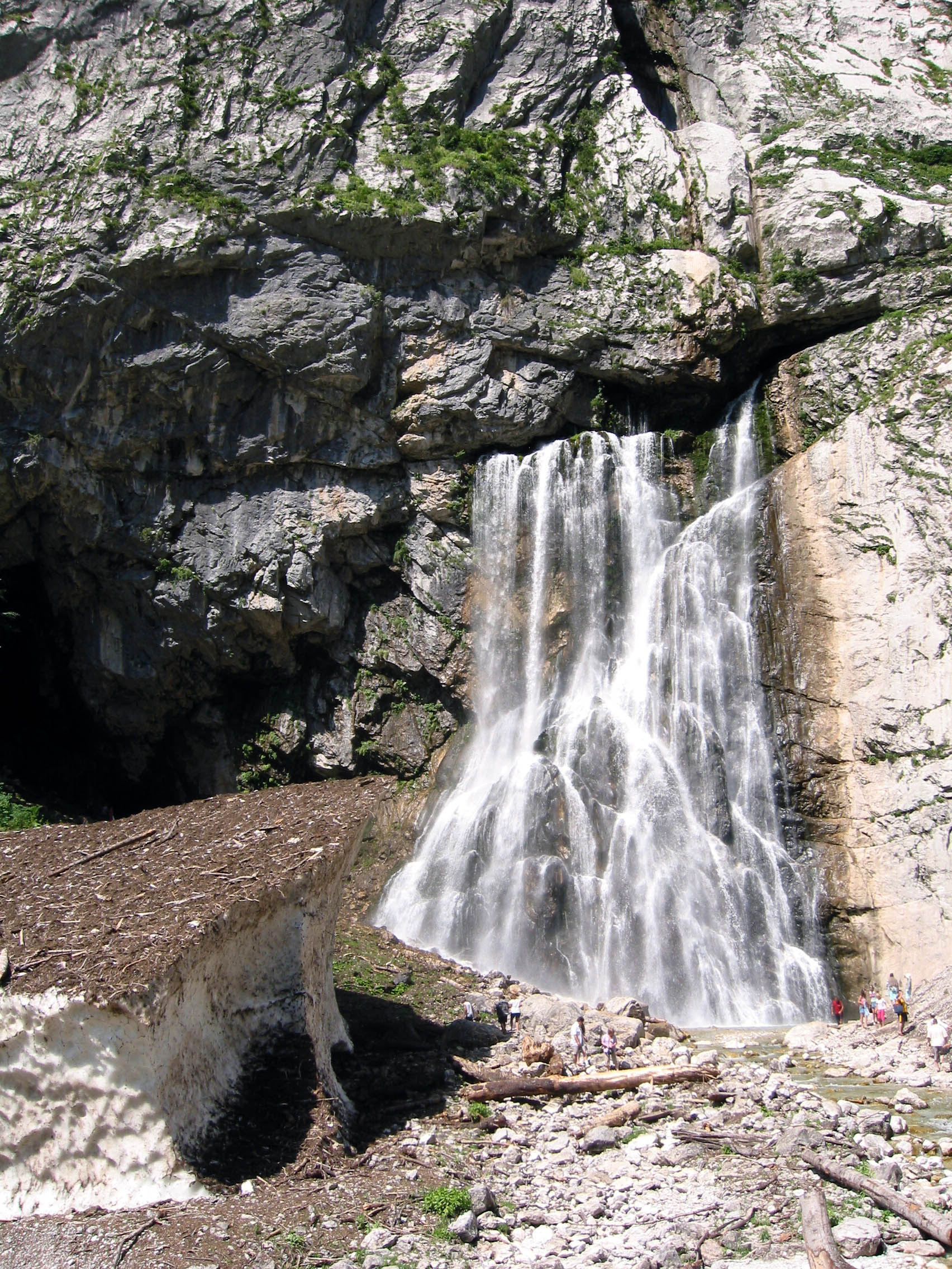 Gegsky waterfall in Abkhazia. Glacier is seen at left.